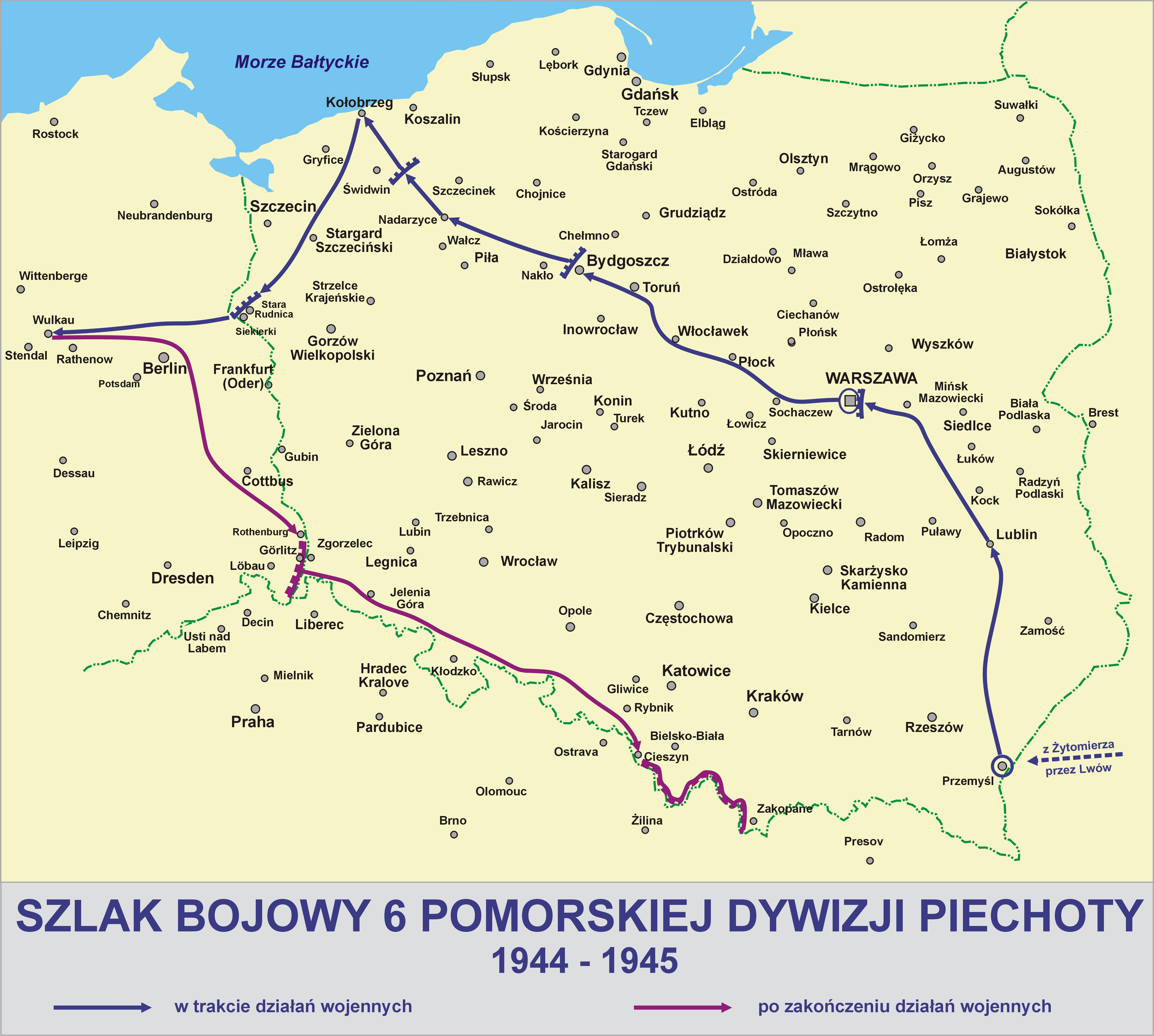 Szlak bojowy 6 Pomorskiej Dywizji Piechoty 1944 -1945